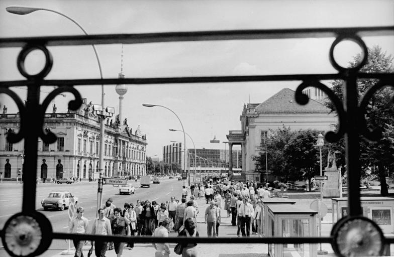 ADN-ZB Schindler 10.8.79 Berlin: Dieser reizvolle Blick auf die Straße Unter den Linden zeigt auf eigene Weise die Schönheit der Linden-Promenade.